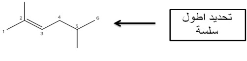 تحديد اطول سلسله بالالكينات